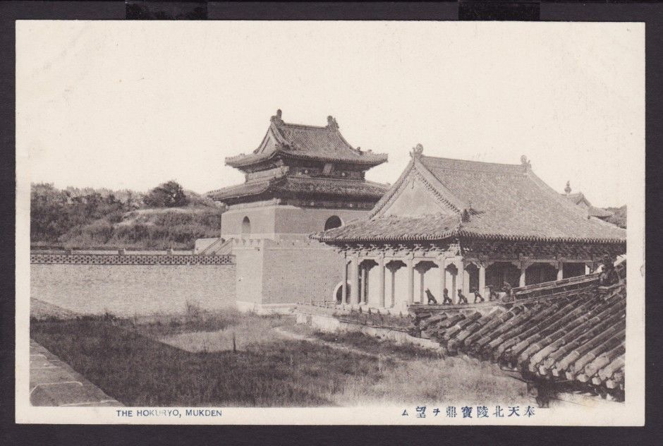 奉天北陵宝顶